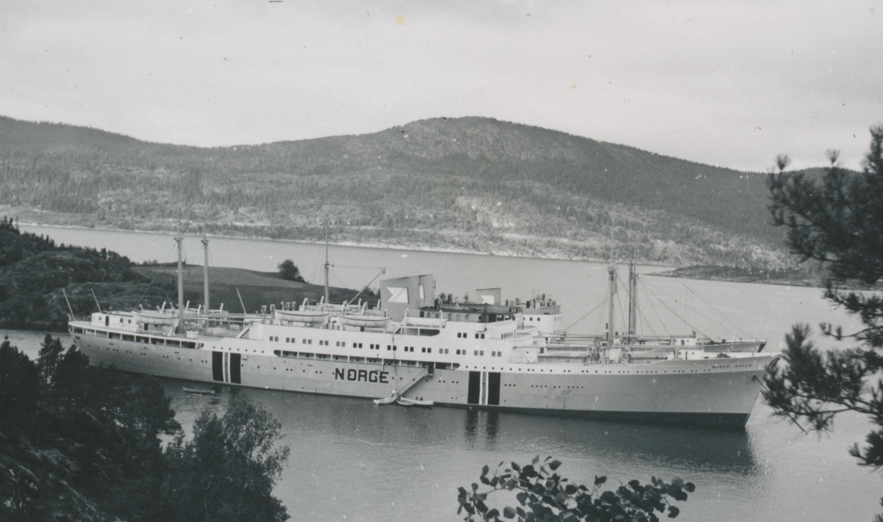 Fred. Olsens båter "Black Watch", "Black Prince" og "Bretagne", lå i Lofjorden i Åsen fra september 1939 til september 1940. Bildet er tatt i 1939. Fotograf / Photographer: Ukjent Fotoeier / Photo owner: Johannes Naavik Digitalisering / Digitizing: Arne Langås (2009) Foto-ID / Photo ID: 043-0350 Hvis bildet gjengis i andre sammenhenger, oppgi Åsen Museum og Historielag, fotoeier og fotograf som kildereferanse. Har du utfyllende opplysninger? Legg gjerne igjen en kommentar nedenfor eller send e-post til . | If you re-use this photo, please refer to Åsen Museum og Historielag, the photographer and the owner of the photo. Do you have additional information? Please leave a comment or send an e-mail to .